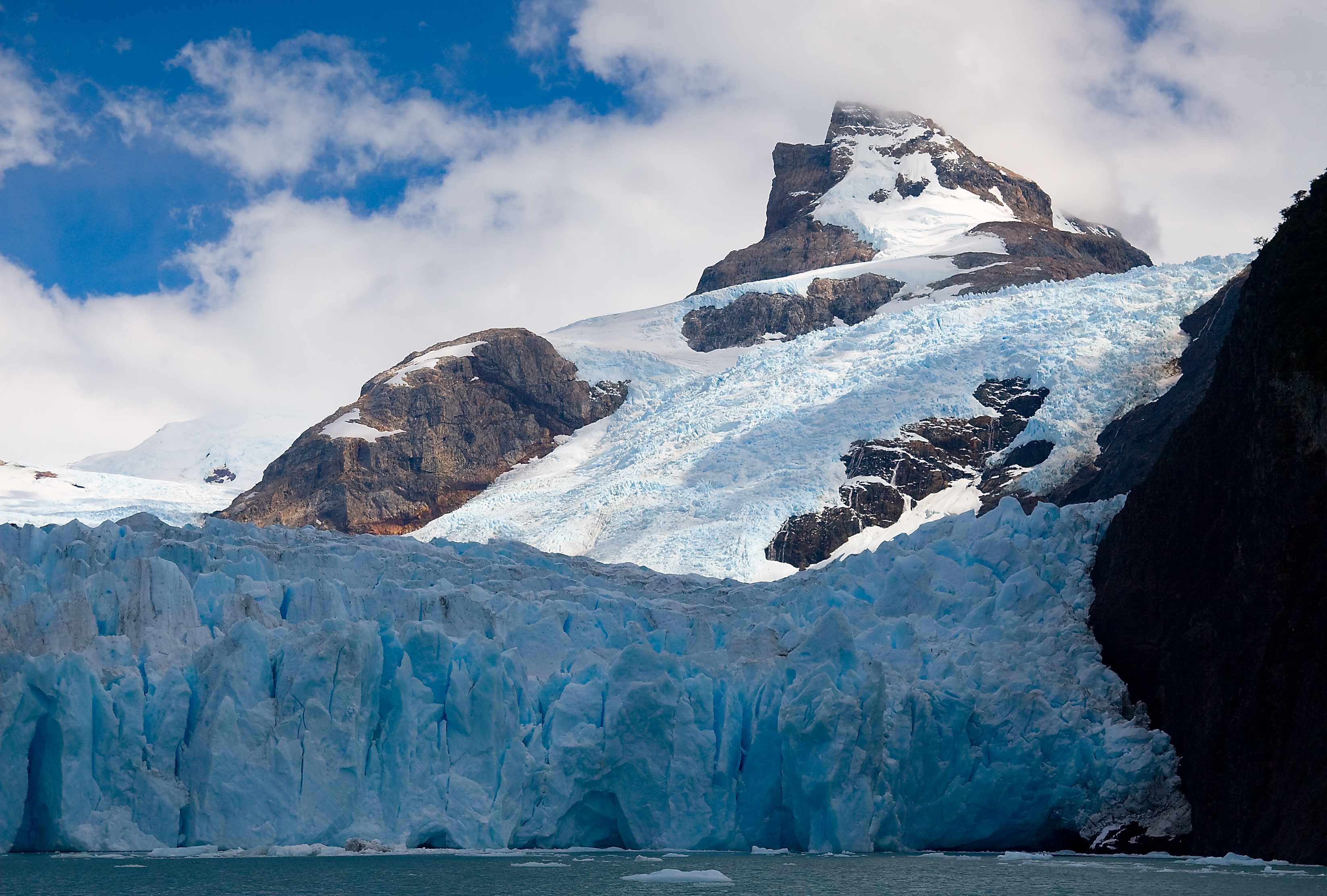 Upsala Glacier, Argentina